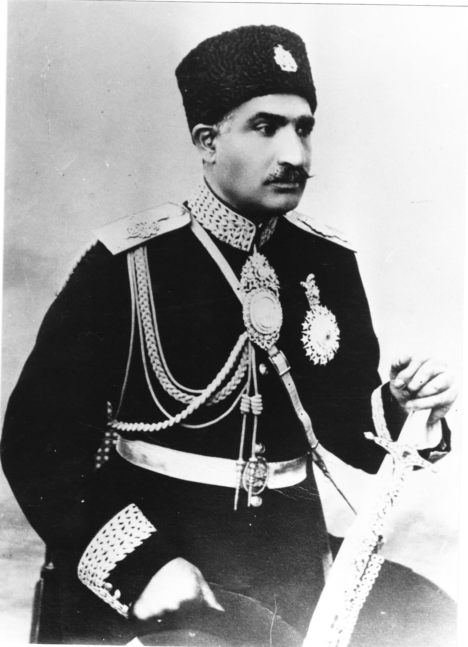 Reza Khan, futur Reza Shah, alors ministre de la Guerre entre 1921 et 1923